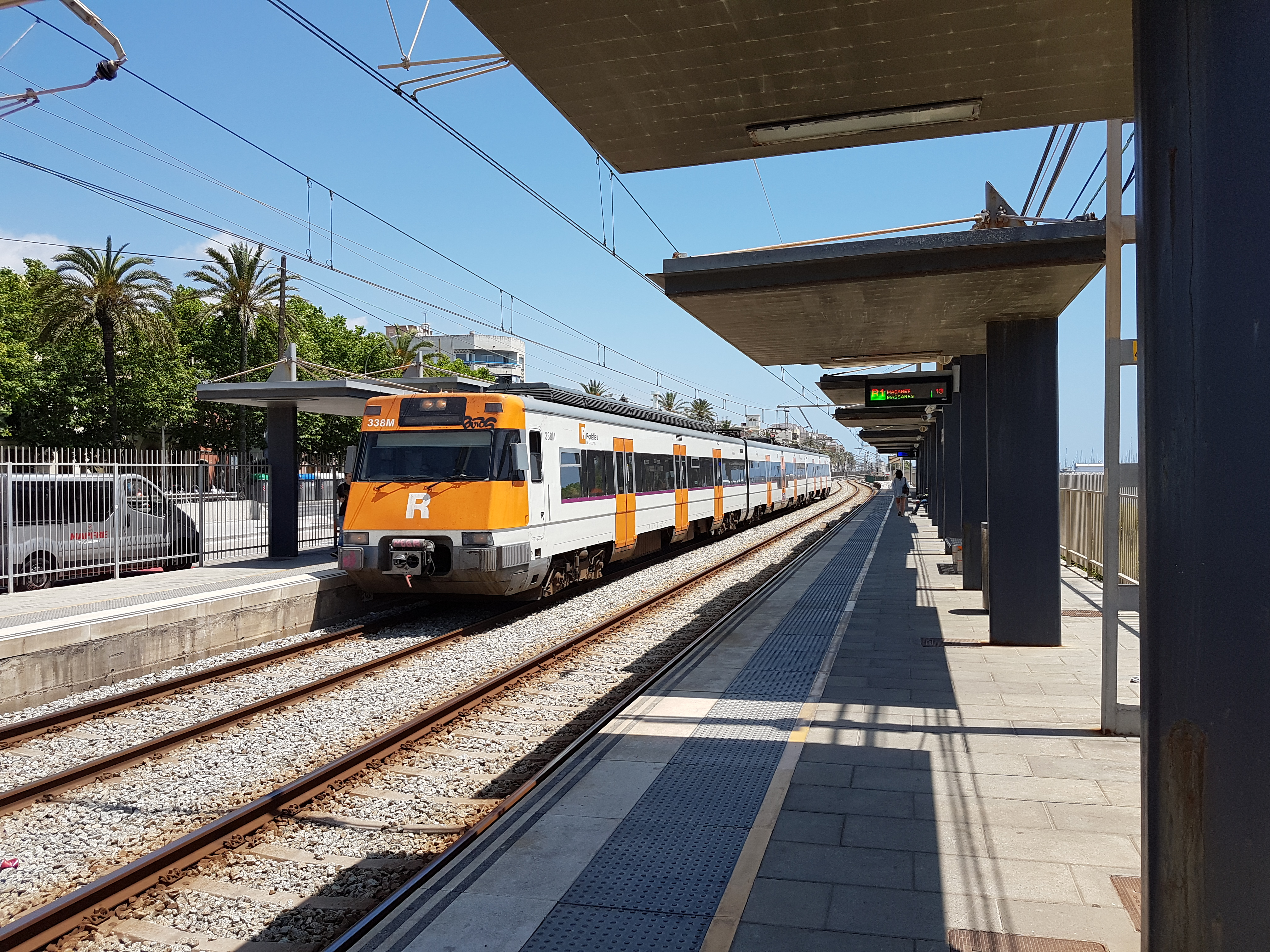 Tren de la sèrie 447 amb servei R1 L'Hospitalet a l'estació de Premià